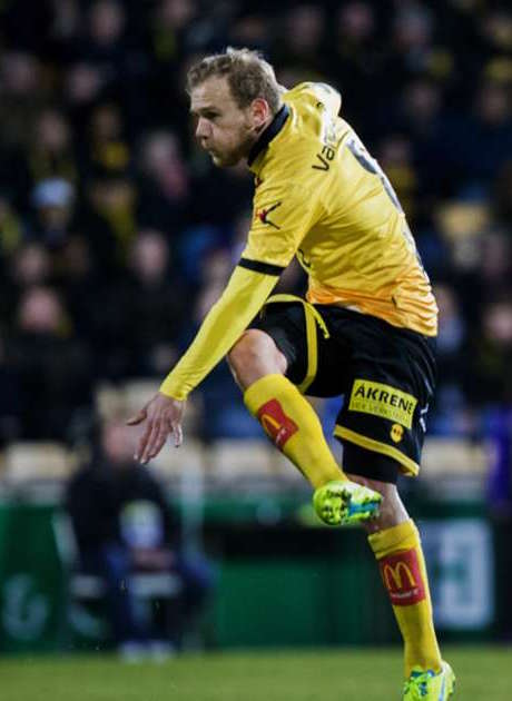 Malaury Martin - LSK vs Bodø/Glimt